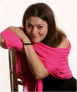 Foto de Nairi Grigorian